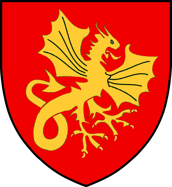 Vapensköld för svenska frälseätten Drake från Sunnerbo